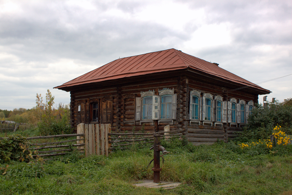 Старый дом в селе Бутаково Омской области.